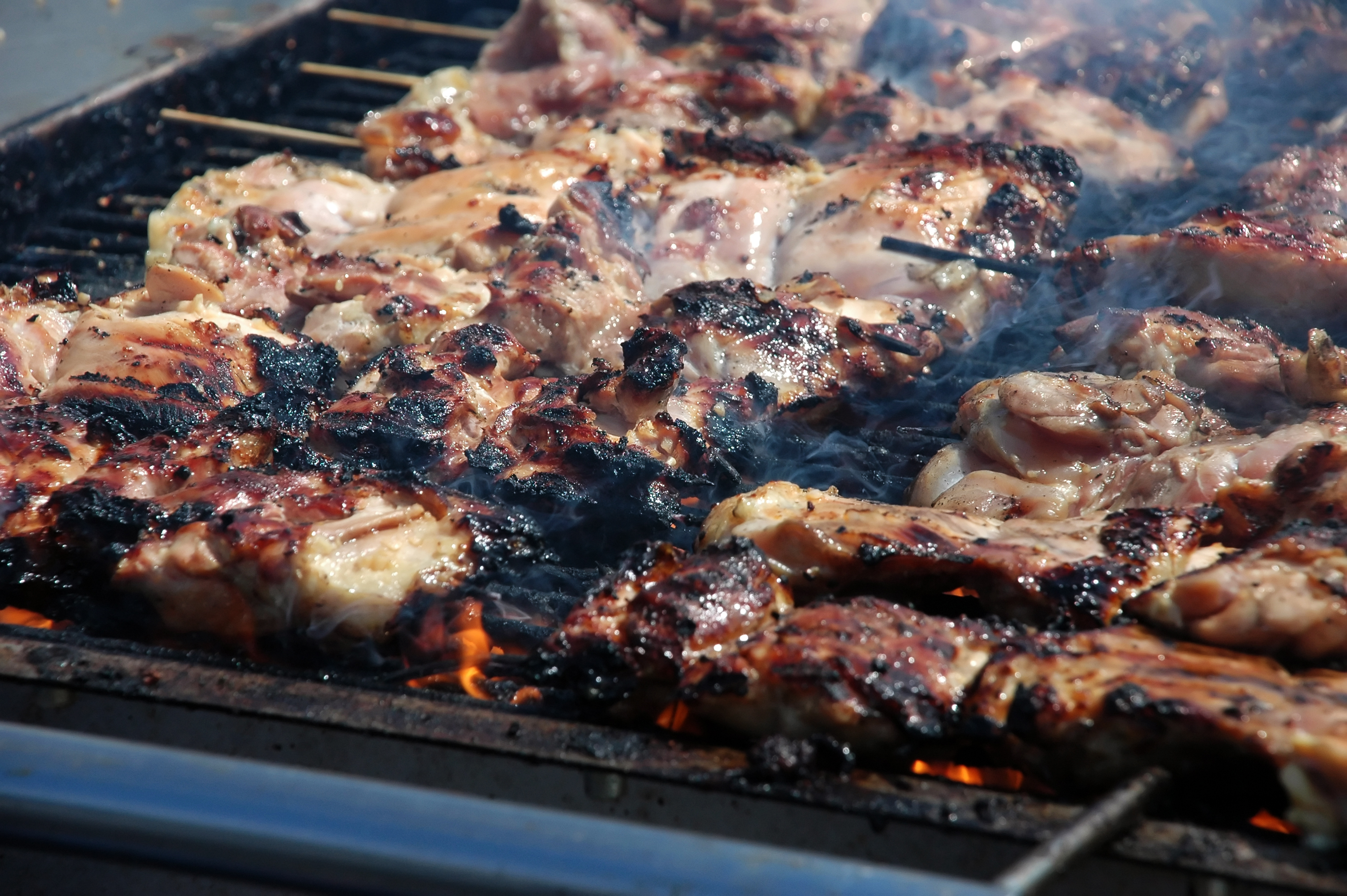 Maker Faire 2008, San Mateo - Chicken Kebabs